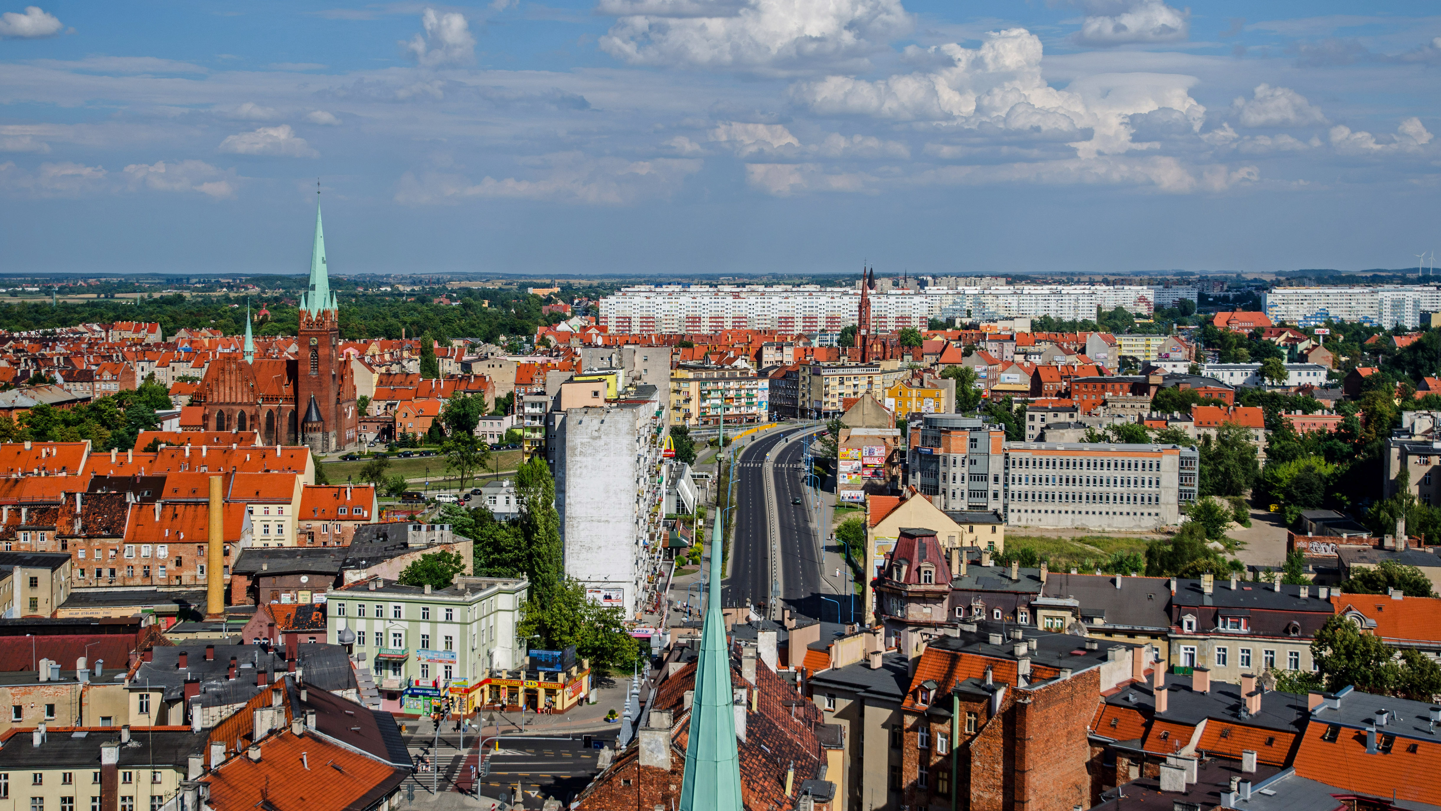 Legnica, obszar zabytkowy miasta, ograniczny ulicami: Pocztową, Piastowską, Komuny Paryskiej, Dziennikarską, Muzealną, południową stroną ul. Fryderyka Skarbka, Powstańców Śl, Aleją Orła obejmując tzw. Kozi Staw, do ul. Wrocławskiej i wschodnią stroną ulicy Parkowej do ul. Pocztowej, XIII, XVII